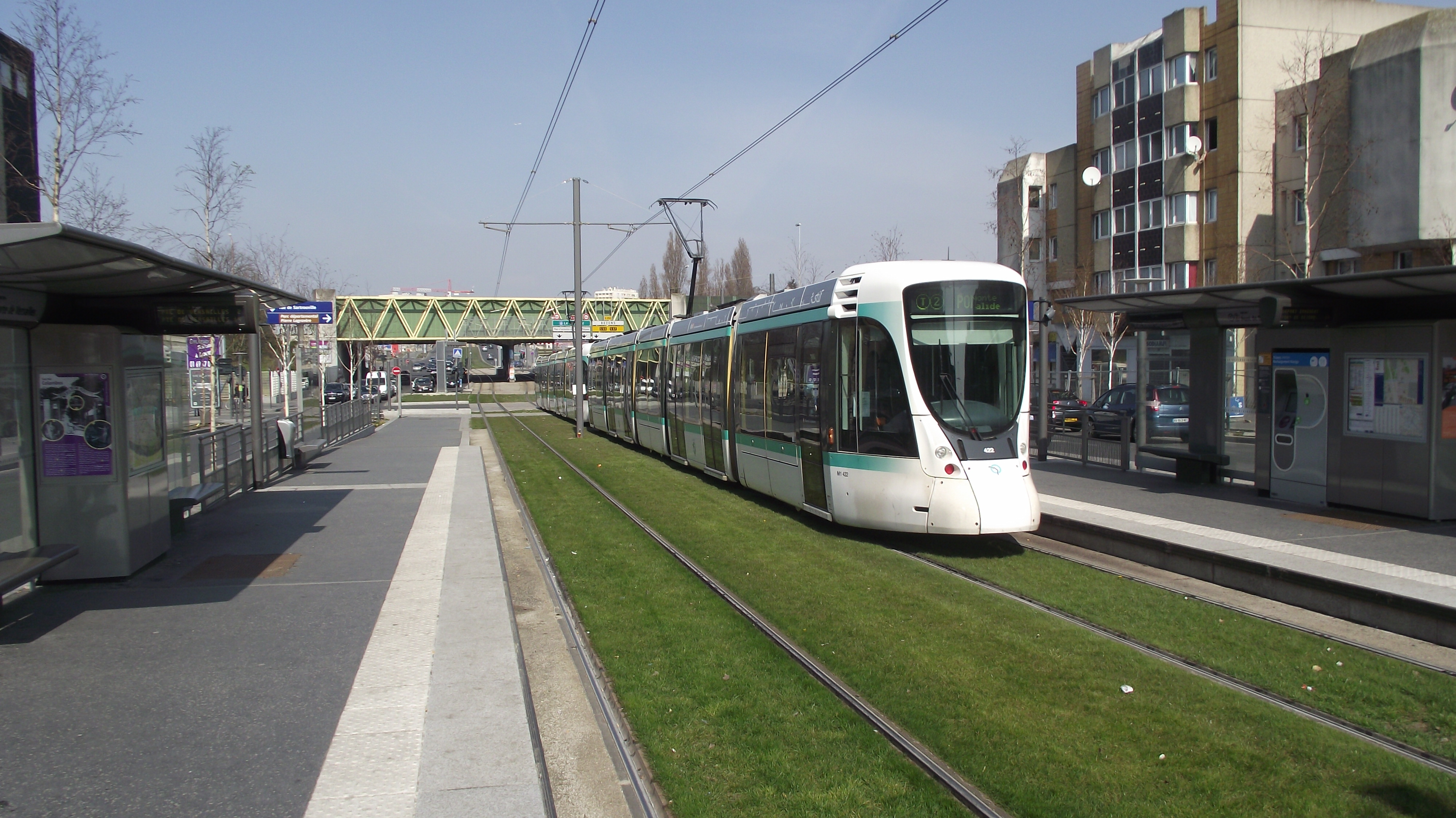 Trams bij de halte "Parc Pierre Lagravère" bij de verlenging naar het Noorden van de T2-tramlijn.